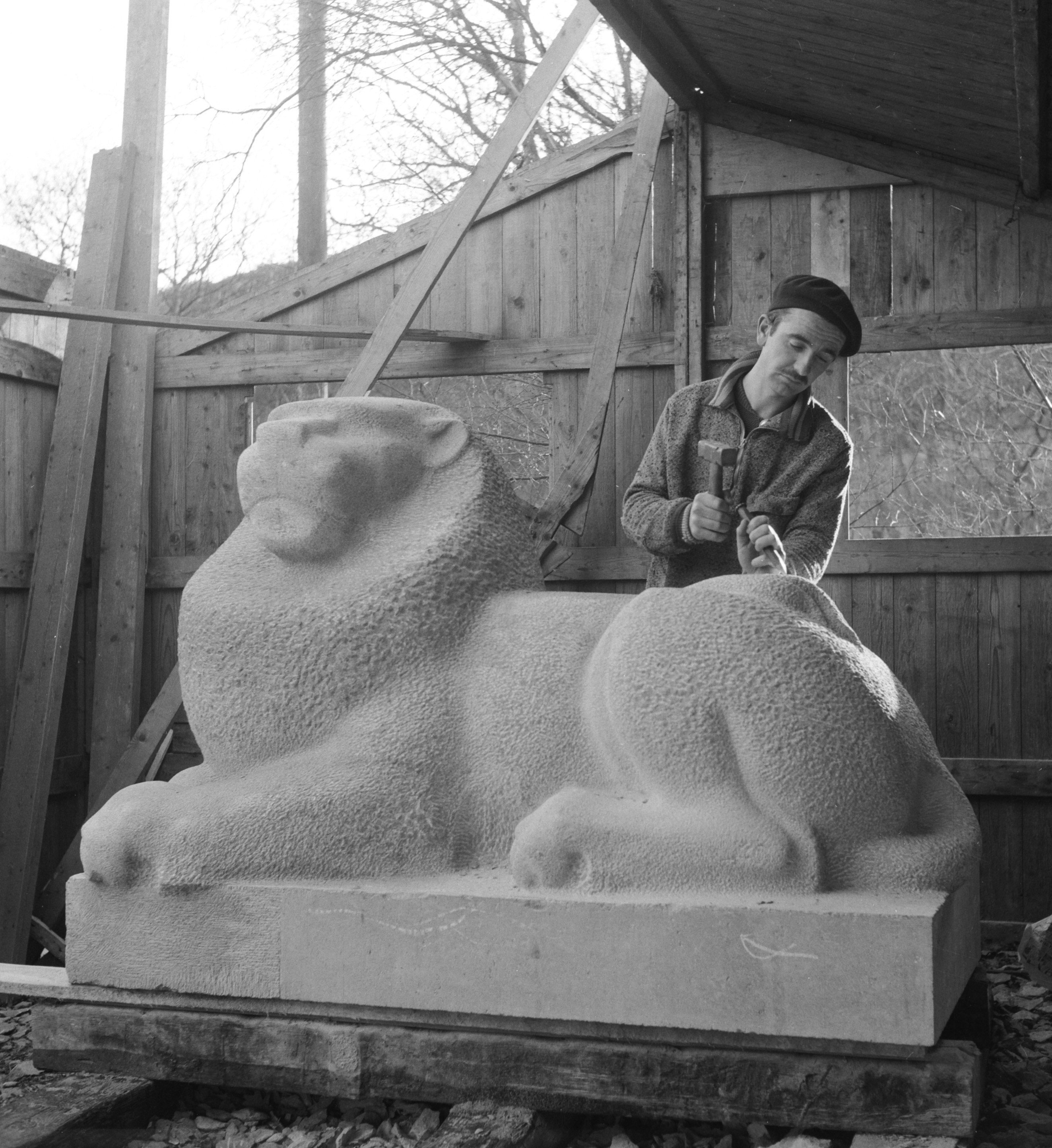 Collectie / Archief : Fotocollectie Anefo Reportage / Serie : [ onbekend ] Beschrijving : Beeldhouwer Jan Willem Rädecker [Noekie Rädecker] bij leeuw bestemd voor monument militaire begraafplaats Grebbeberg Annotatie : Noekie Rädecker was de zoon van beeldhouwer John Rädecker, die aanvankelijk de opdracht aannam voor het monument Grebbeberg. De uitvoering werd echter gedaan door zijn zoon Datum : 28 februari 1951 Locatie : Amsterdam, Noord-Holland Trefwoorden : beeldhouwers, beeldhouwkunst, kunstenaars, oorlogsmonumenten Persoonsnaam : Rädecker, Jan Willem (Noekie) Fotograaf : Noske, J.D. / Anefo, [onbekend] Auteursrechthebbende : Nationaal Archief Materiaalsoort : Negatief (zwart/wit) Nummer archiefinventaris : bekijk toegang 2.24.01.03 Bestanddeelnummer : 904-4490